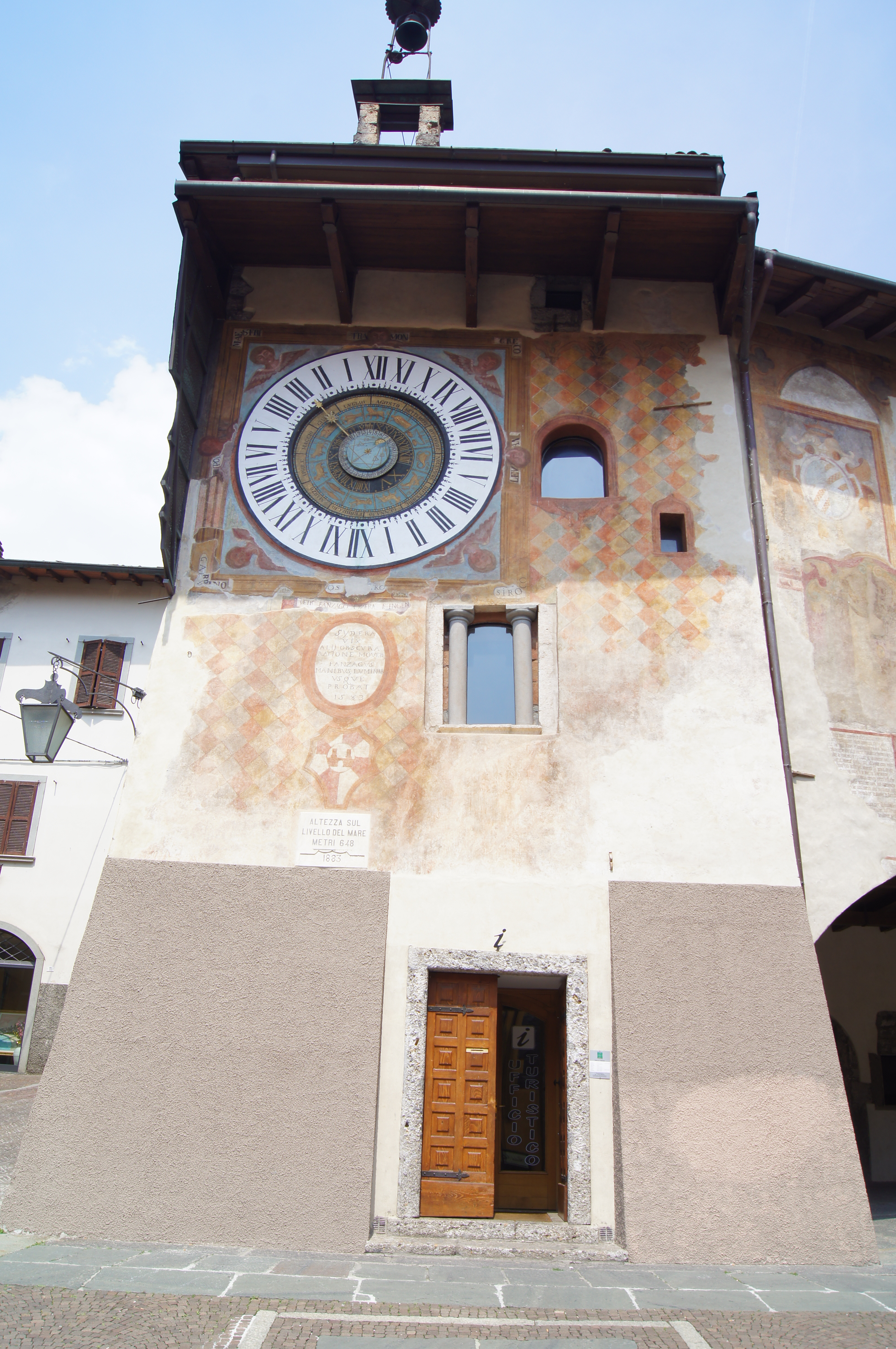 Clusone